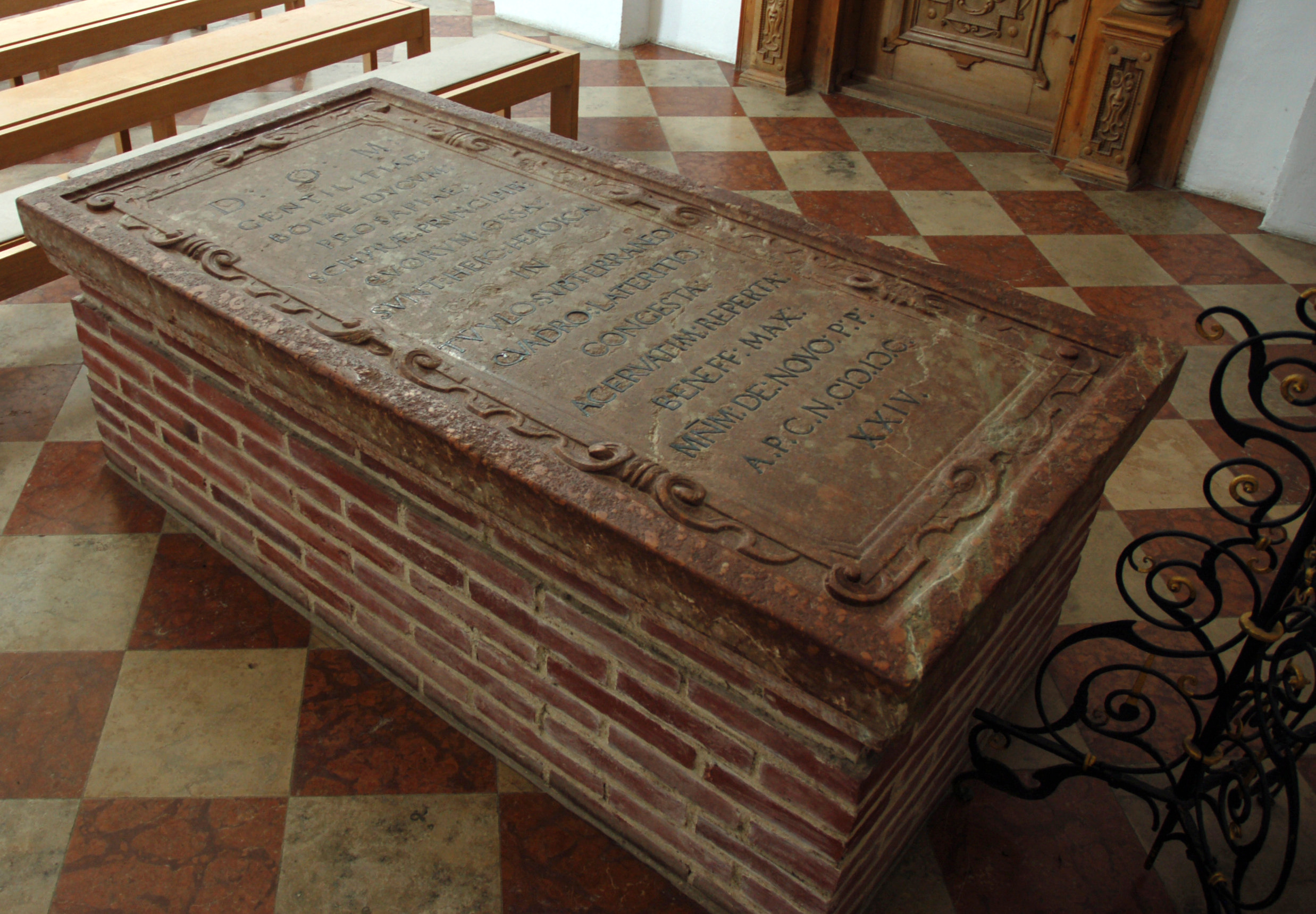 Kloster Scheyern, Landkreis Pfaffenhofen, Oberbayern: Wittelsbachergrab. In ihm ruhen u.a. Herzog Otto I. der Große (1180-1183), Herzog Ludwig I. der Kelheimer (1183-1231), Herzog Otto II. der Erlauchte.